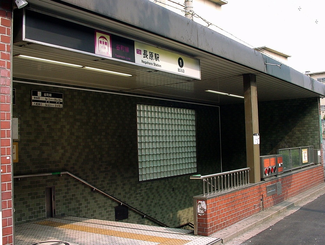 地下鉄谷町線長原駅1号出入口